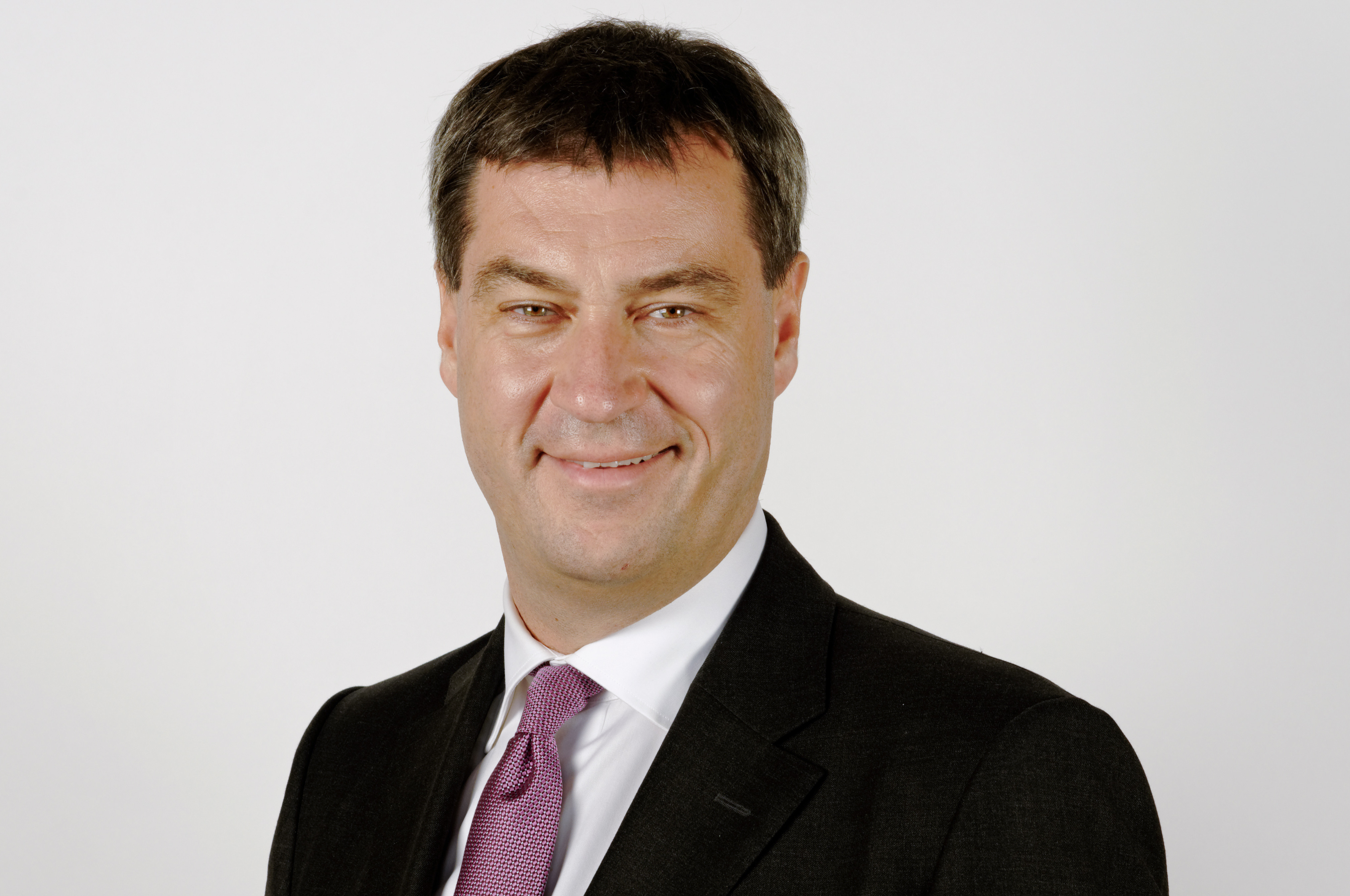 Landtagsprojekt Bayern